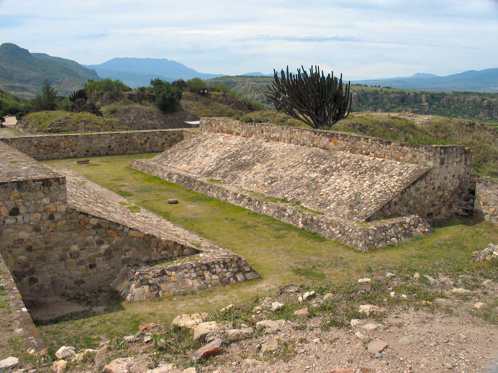 Ball court at Yagul, Oaxaca